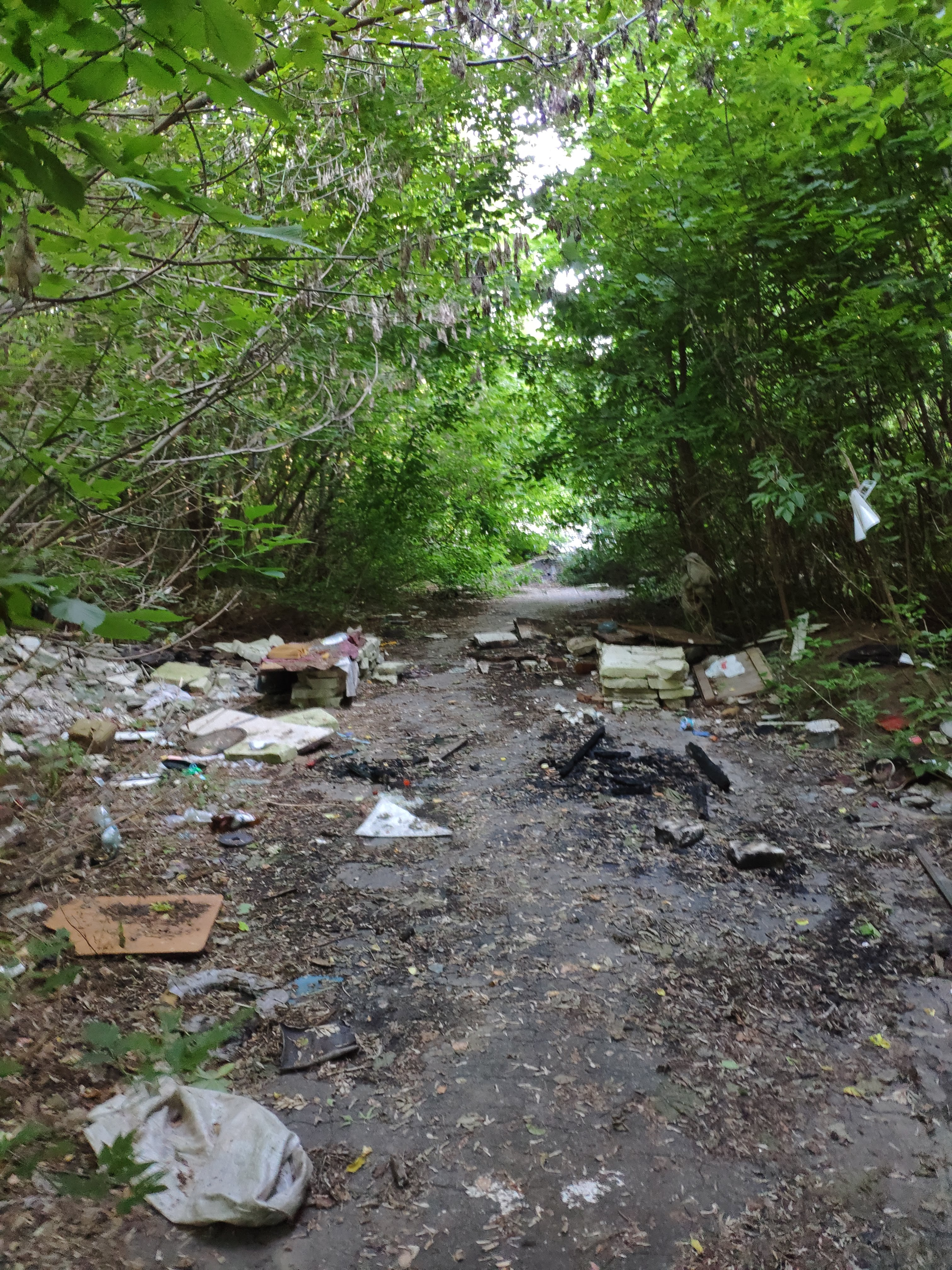 Артилерійські склади "апартаменти" безхатьків